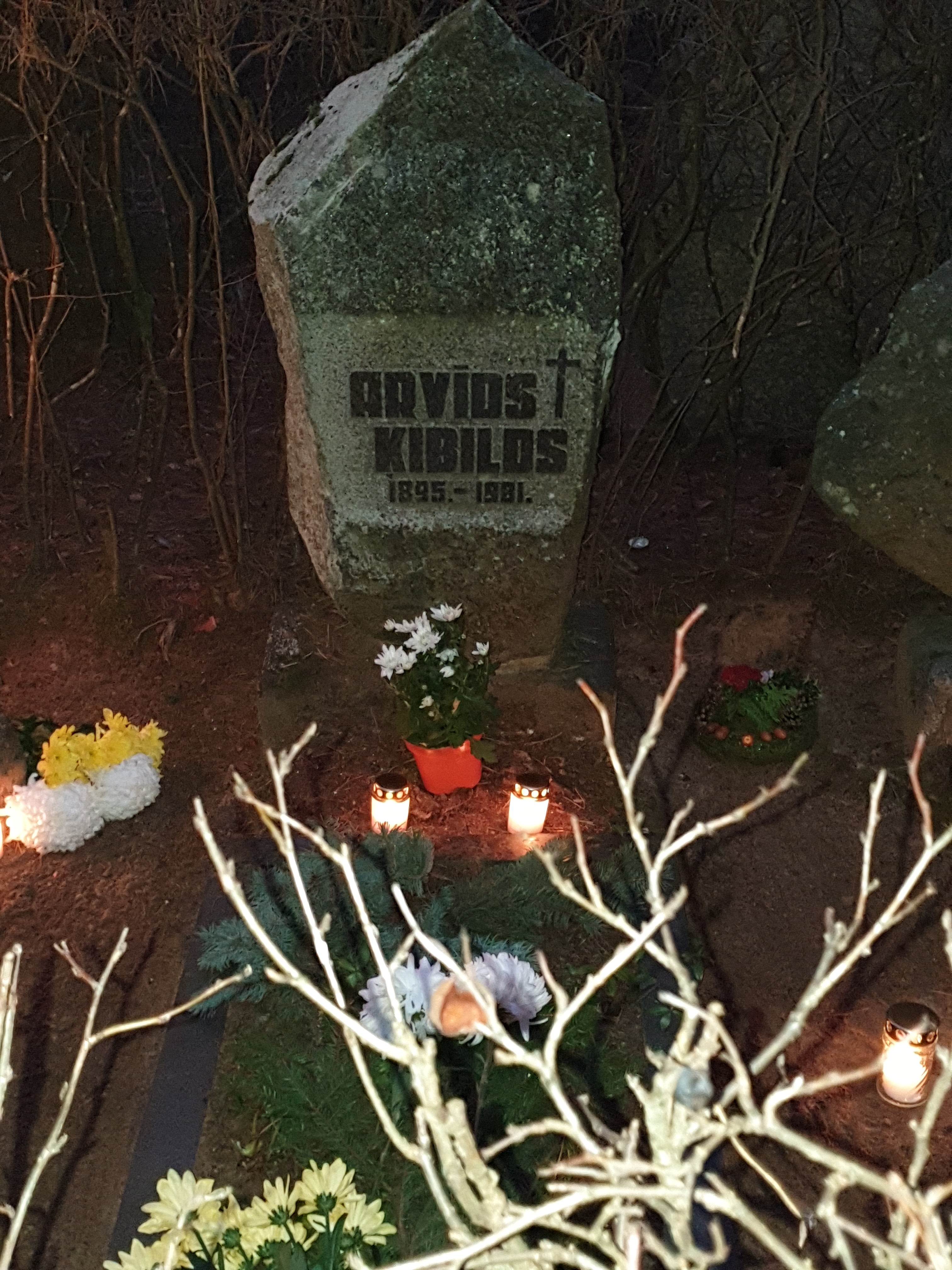 Arvīda Ķibilda kapa vieta Jaunciema kapos, Rīgā